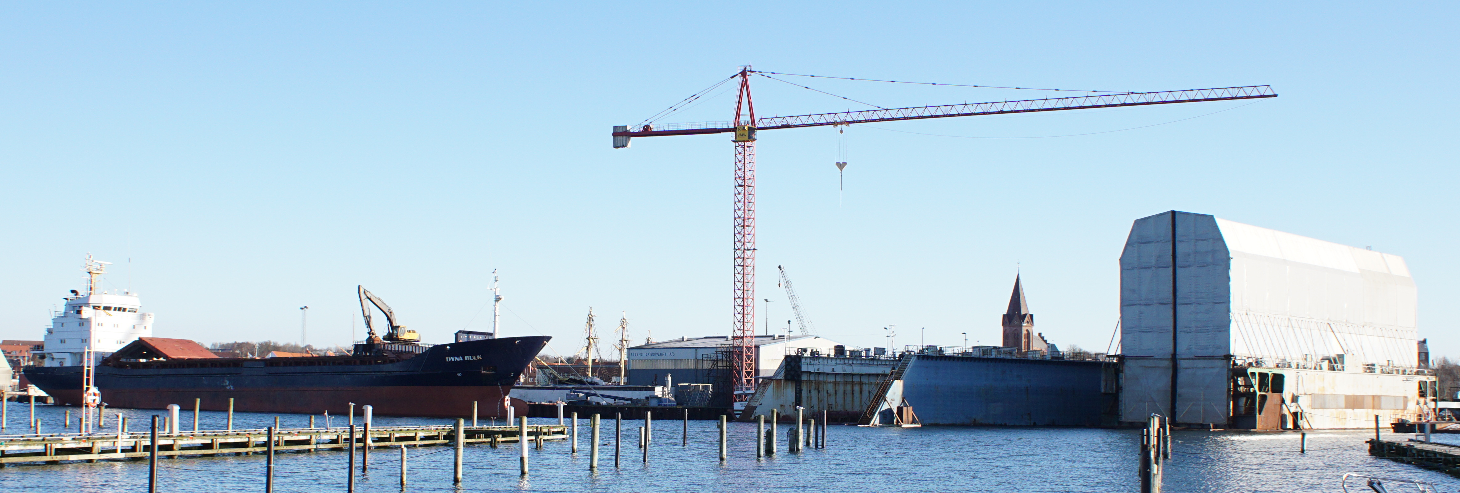 Assens Skibsværft set fra marinaen.